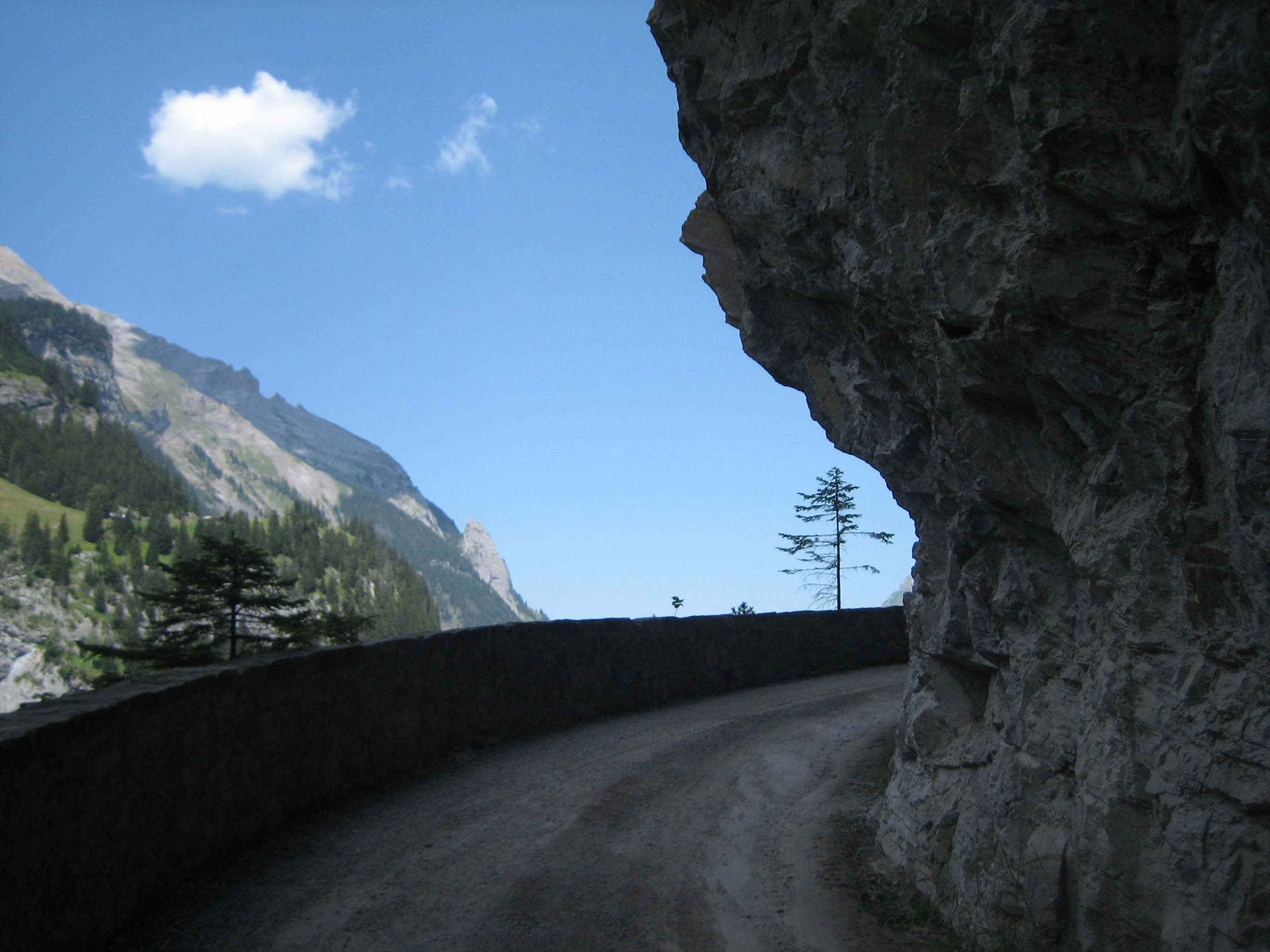 Kandersteg: Auffahrt ins Gasterntal